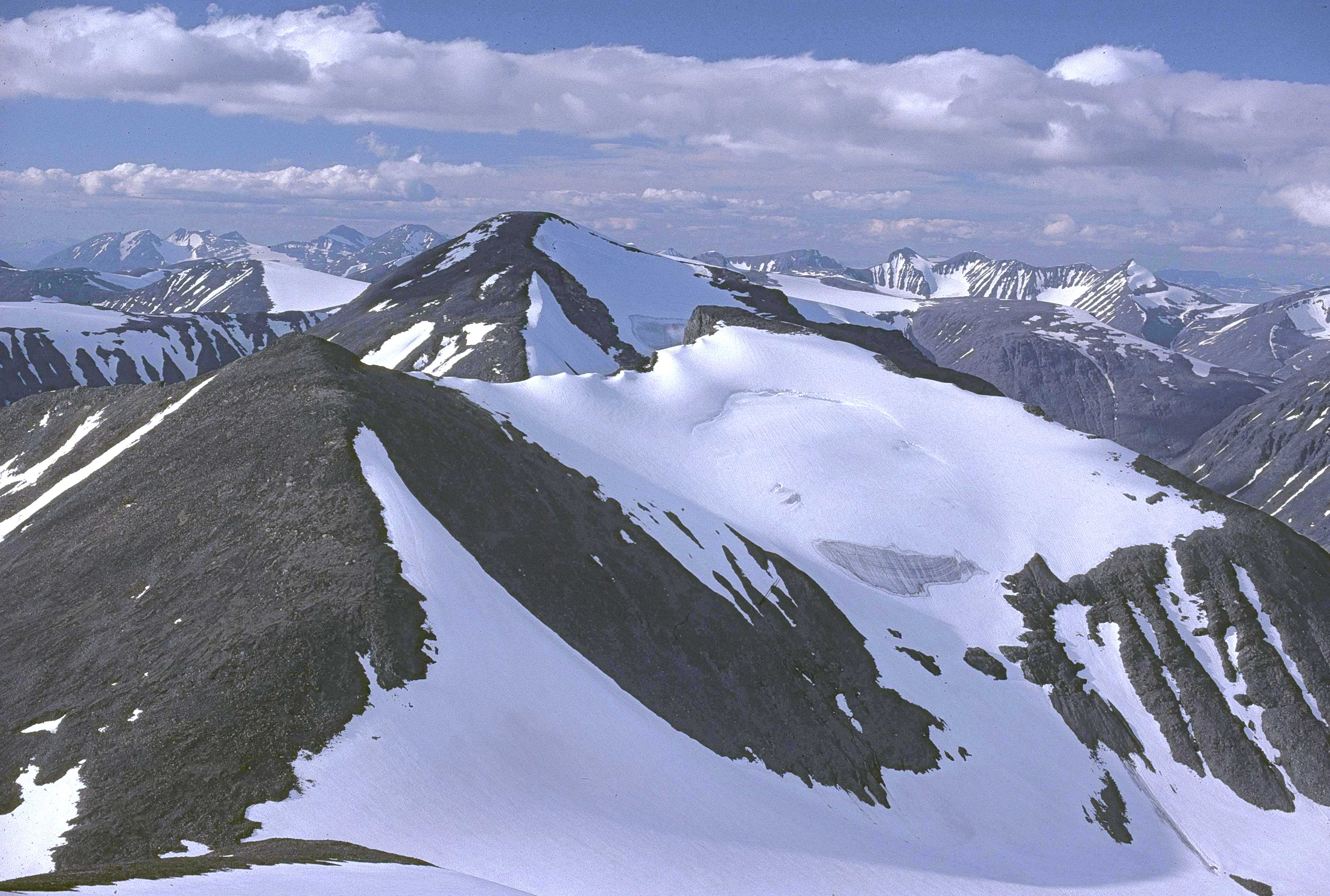 Sadelberget in Sarek National Park